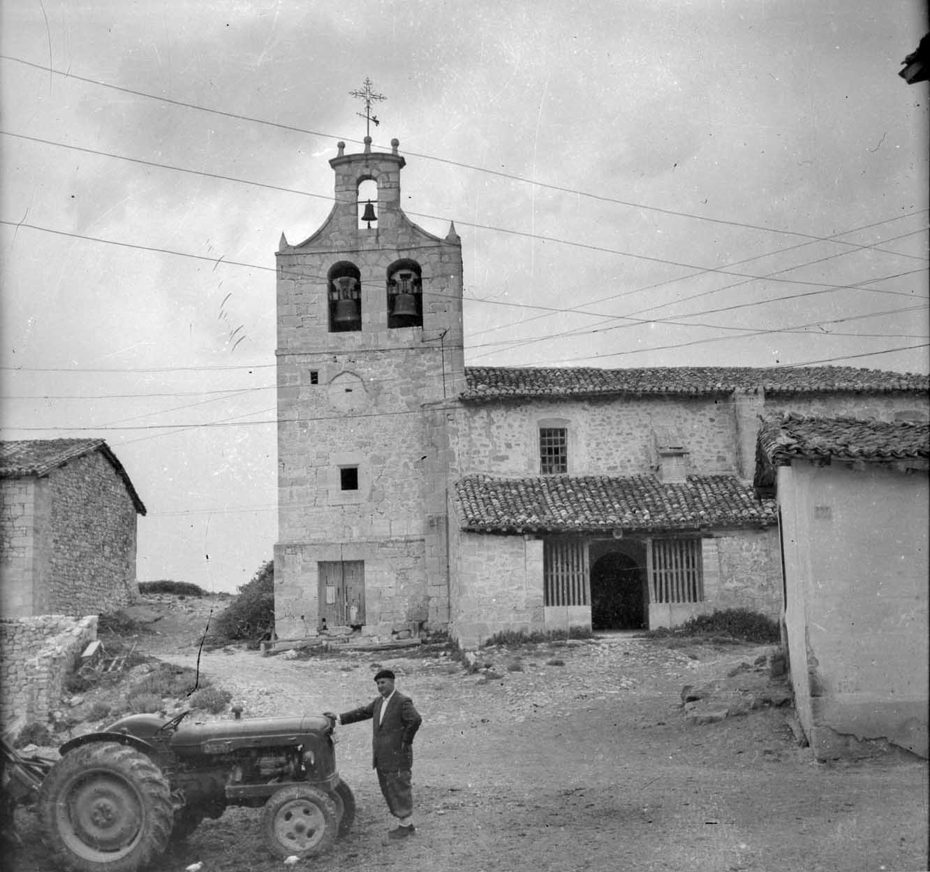 Portilla-Zabalateko eliza 1956. urtean.